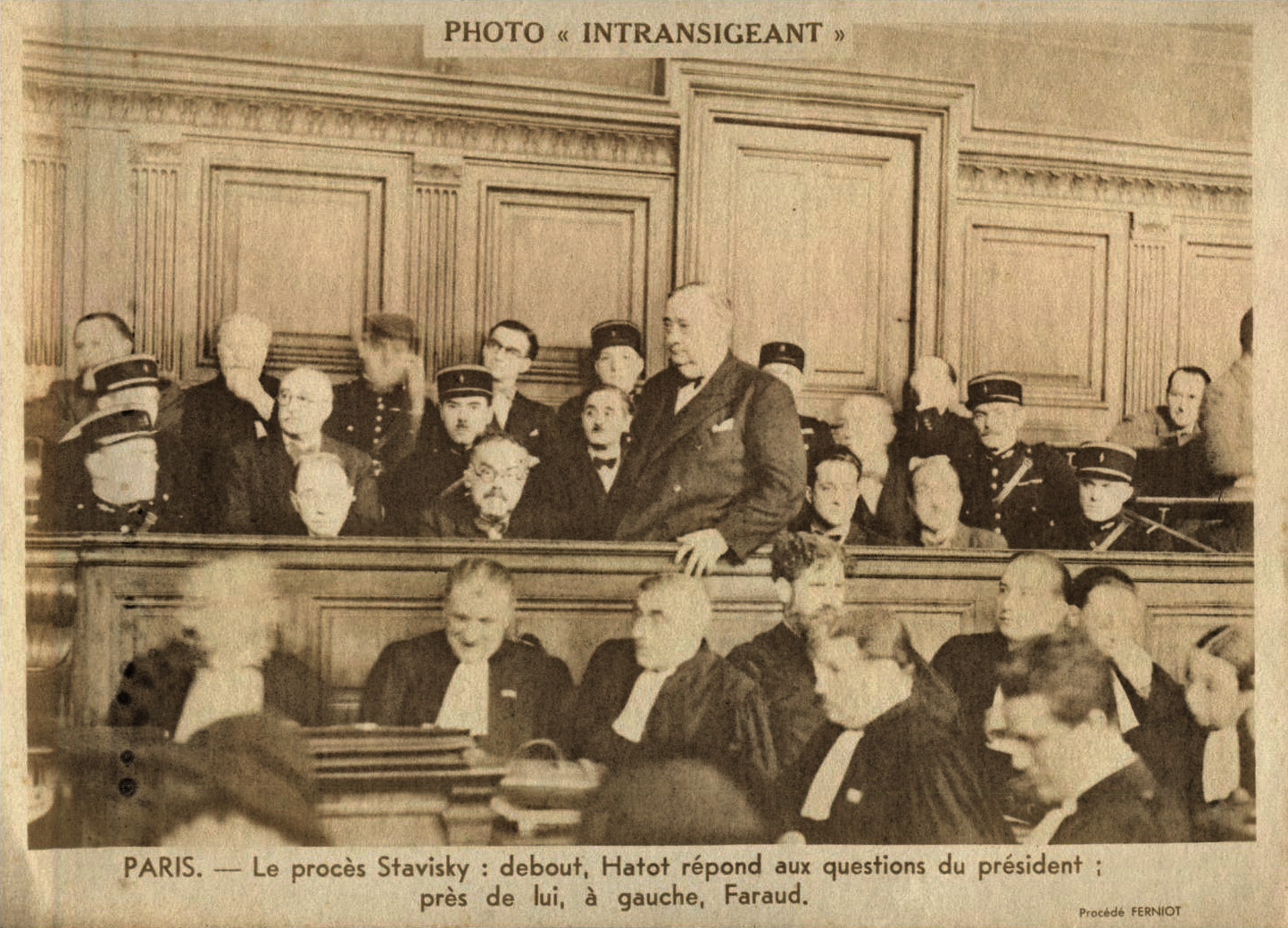 Cliché en héliogravure, tiré d'une série intitulée « Photo "Intransigeant" », représentant une scène d'audience publique au tribunal lors du procès des comparses impliqués dans l'affaire Stavisky